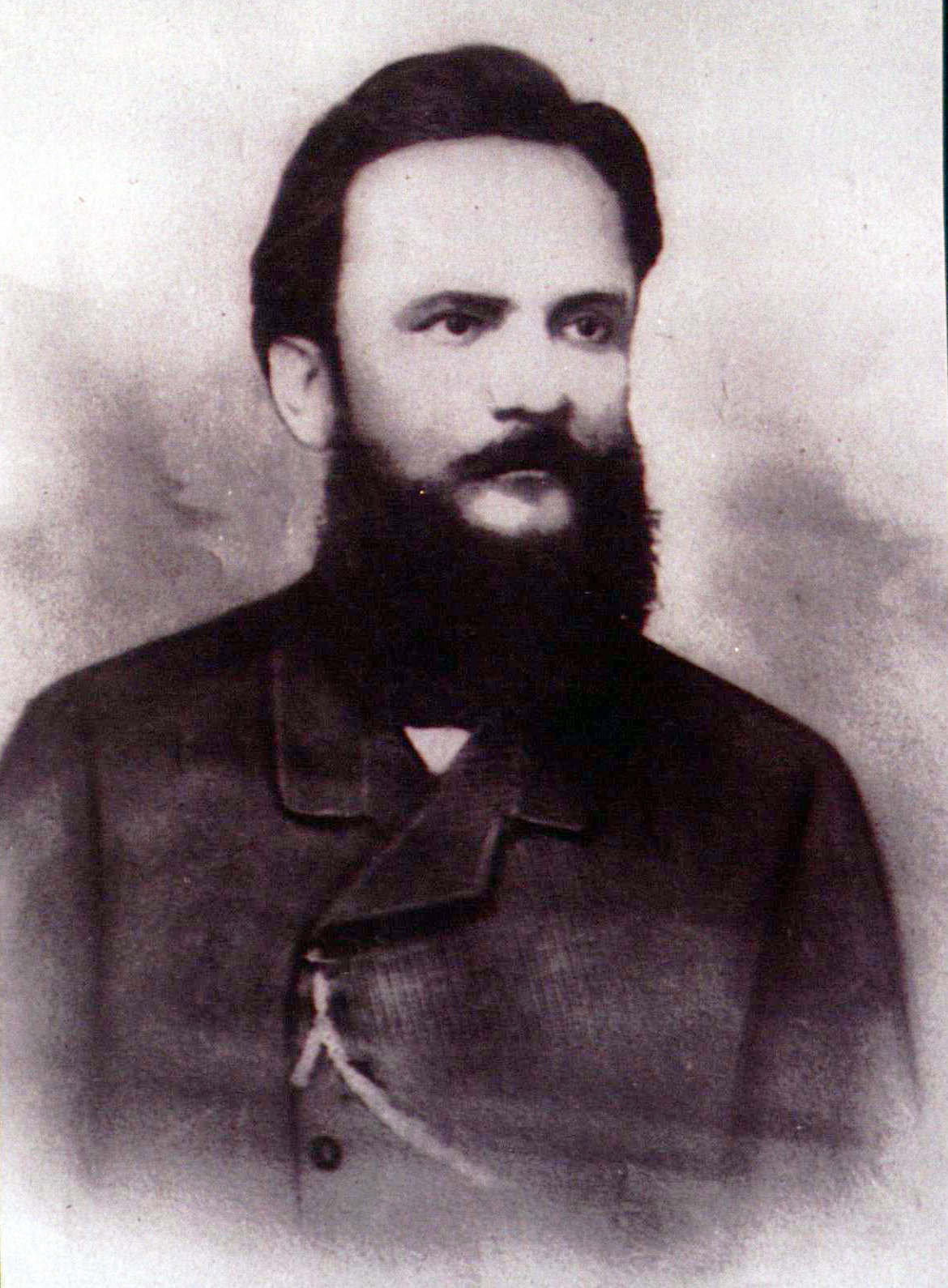 El General venezolano Eduardo Pérez Fabelo, nacido en Maracaibo, Estado Zulia.